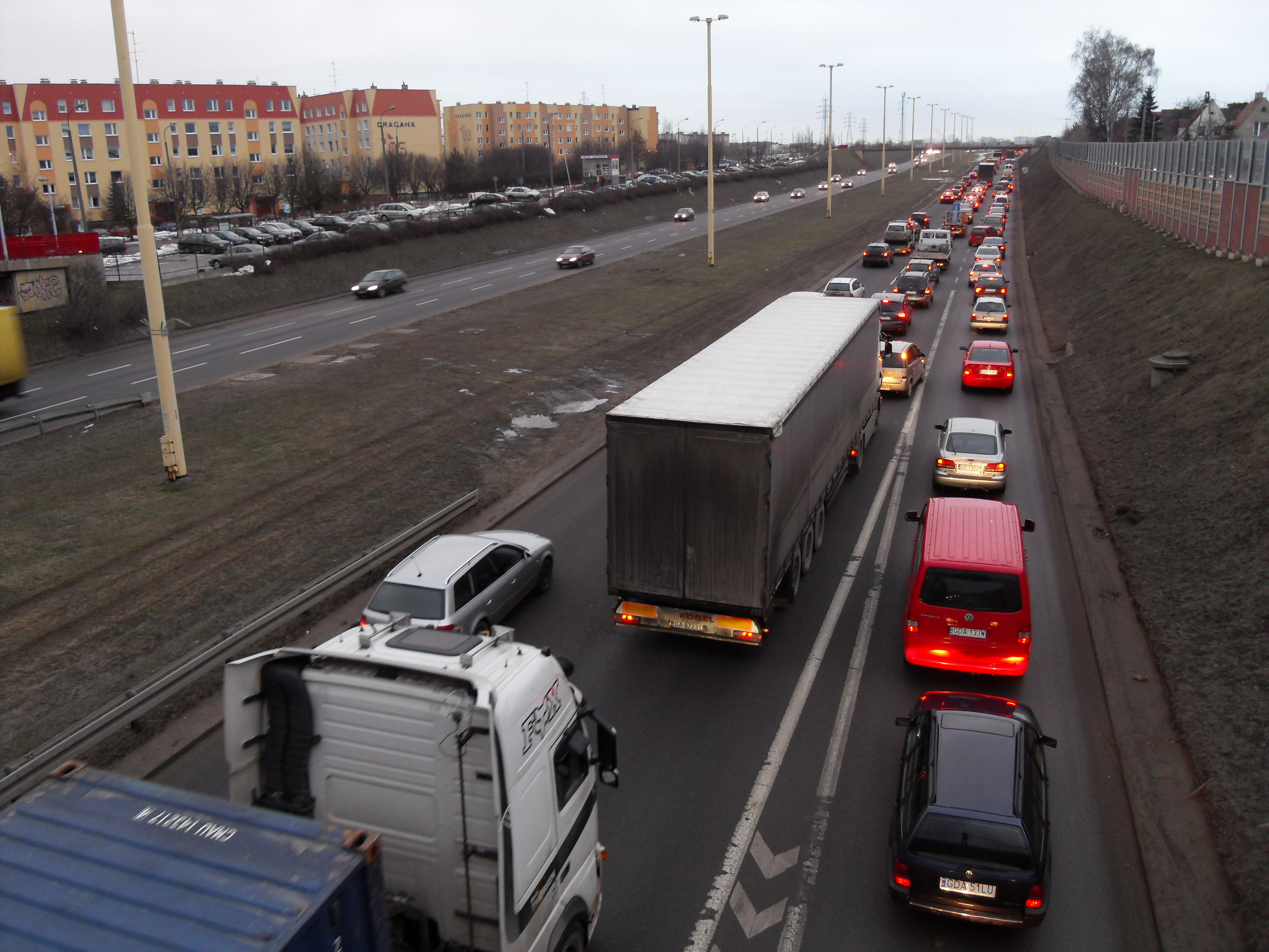 Trasa W-Z w Gdańsku, widok w kierunku zachodnim (wyjazd z miasta), w godzinach szczytu. Po lewej osiedle Chełm, po prawej osiedle Mickiewicza.